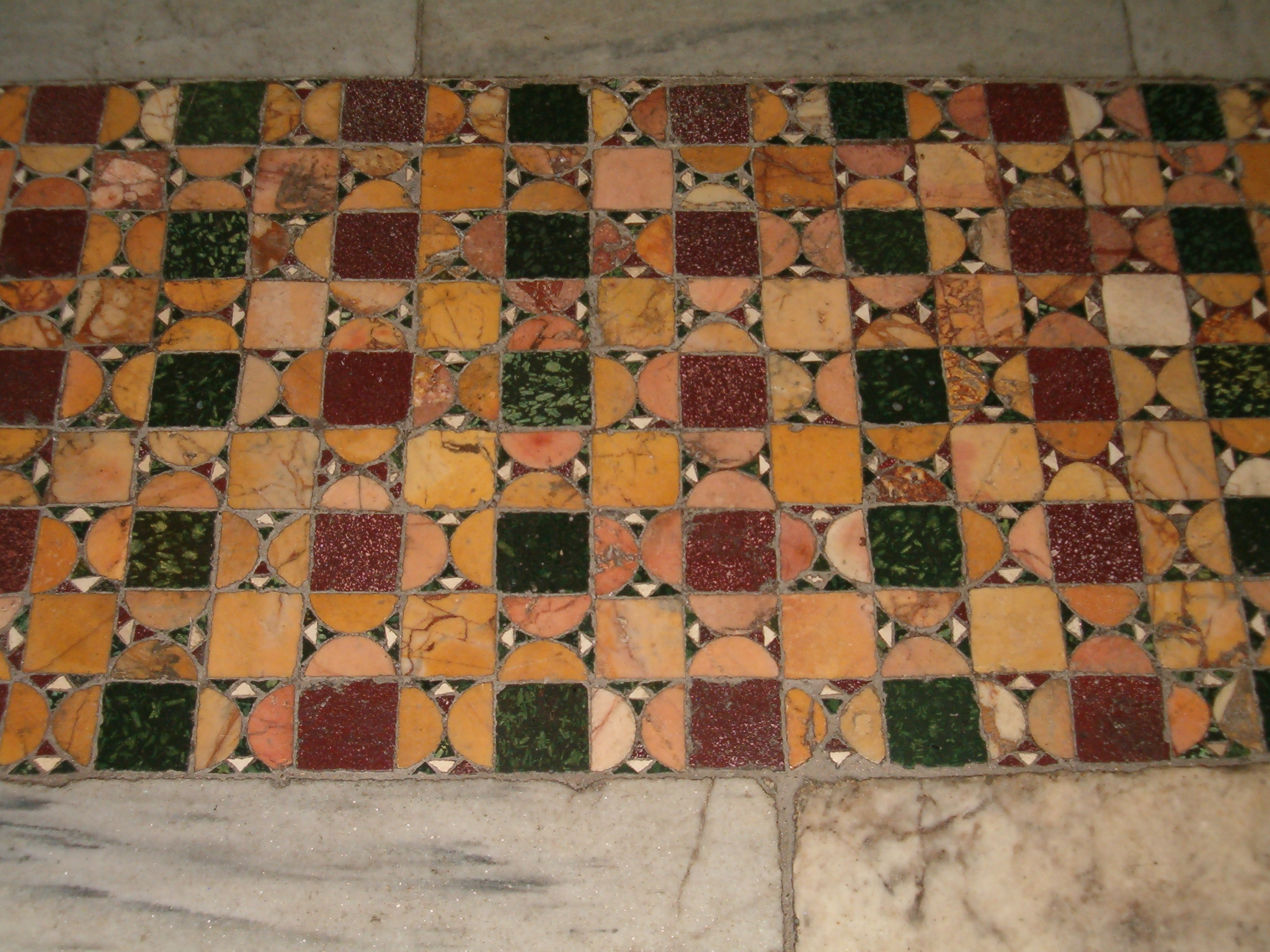 Roma, Basilica di Santa Maria in Cosmedin - Pavimento cosmatesco (particolare)